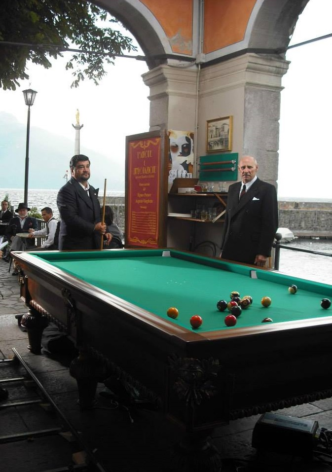 Foto di scena del film "Il pretore" di Giulio Base. Il set al Caffè Clerici di Luino. In piedi attorno al tavolo Francesco Pannofino ed Ermanno Maculan.